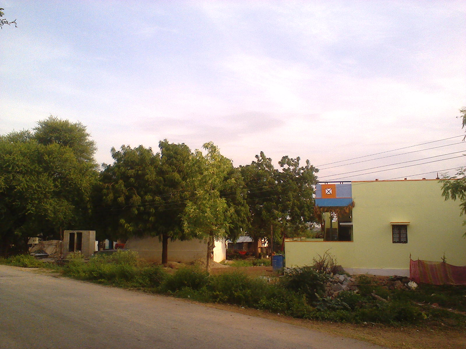 పెద్దపాడు